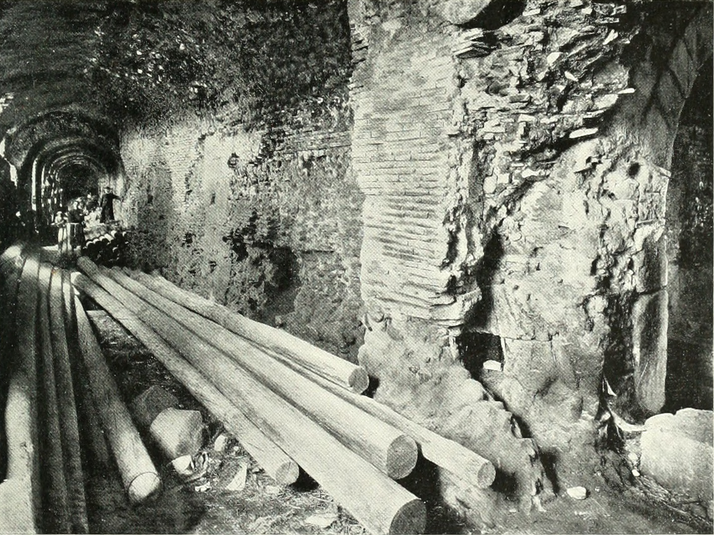 Interno del criptoportico dei Santi Quaranta a Benevento. Almerico Meomartini, Benevento, Bergamo, Istituto Italiano d'Arti Grafiche, 1909